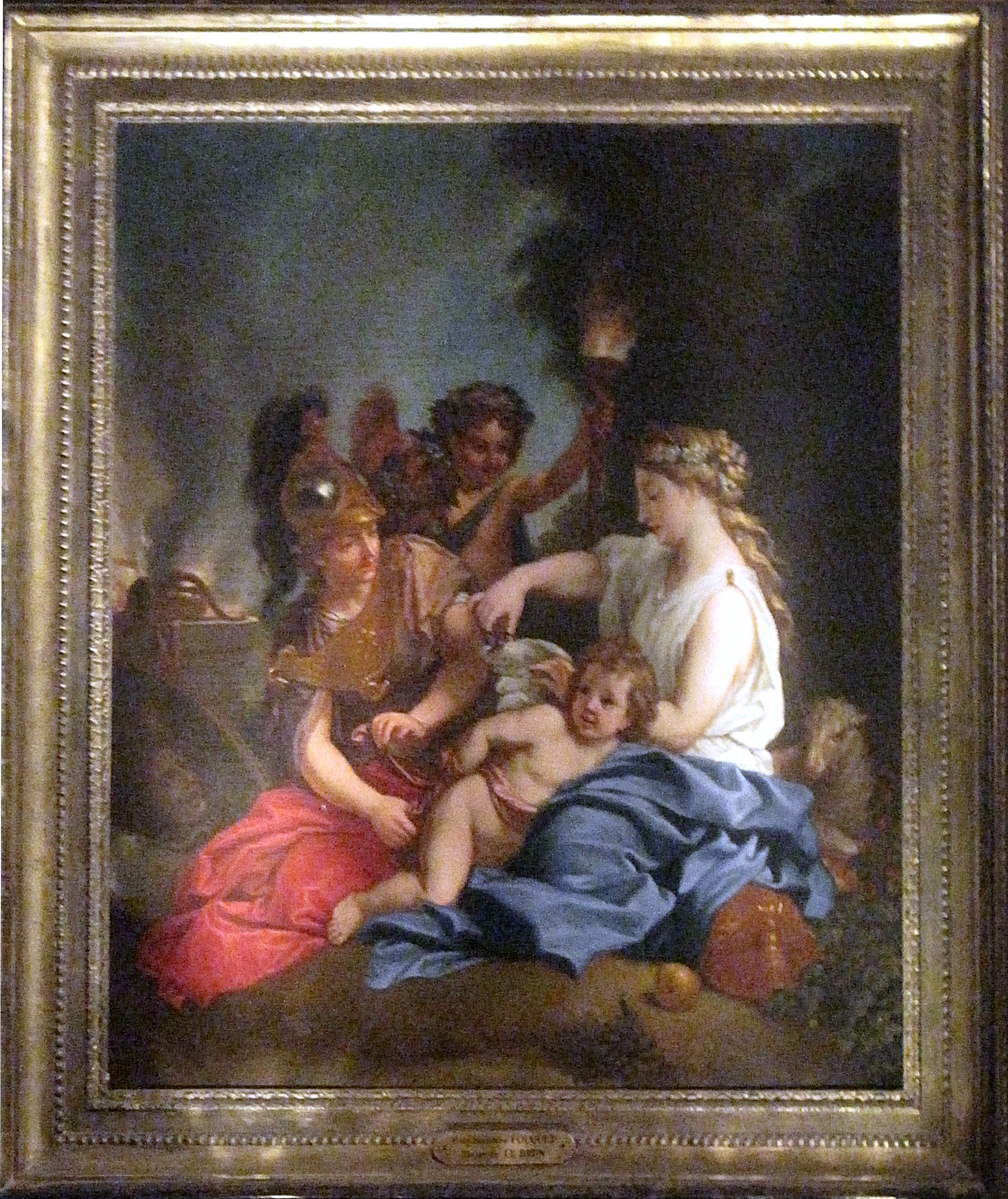 Réplique ancienne du portrait allégorique de Marie-Madeleine de Castille - Mme Fouquet) « La Fidélité coupant les ailes à l’Amour » ou « L’Amour fixé » huile sur toile réalisée au XVIIe siècle par Charles Le Brun, appartenant aux collections du château de Vaux-le-Vicomte - Maincy (Seine-et-Marne, France).